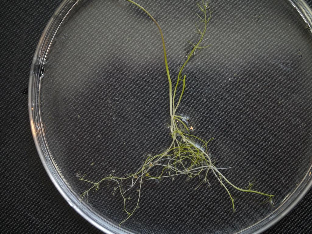 Utricularia exoleta：ミカワタヌキモ 2015/08/01 和歌山県田辺市：Tanabe City. Wakayama Pref. Japan ；栽培品